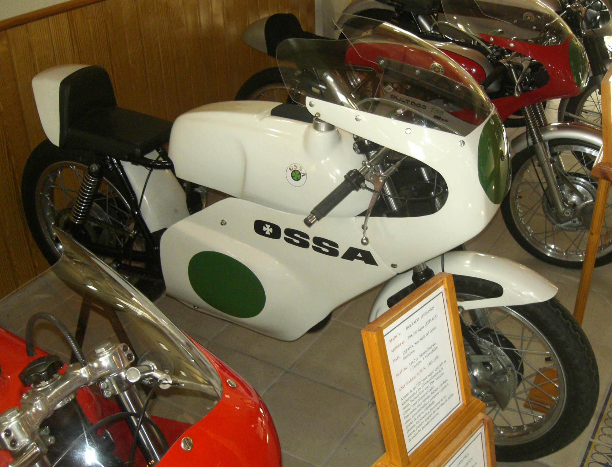 Ossa 250cc GP Bike im "Museo Vehiculo Historico Vall de Guadelest" (